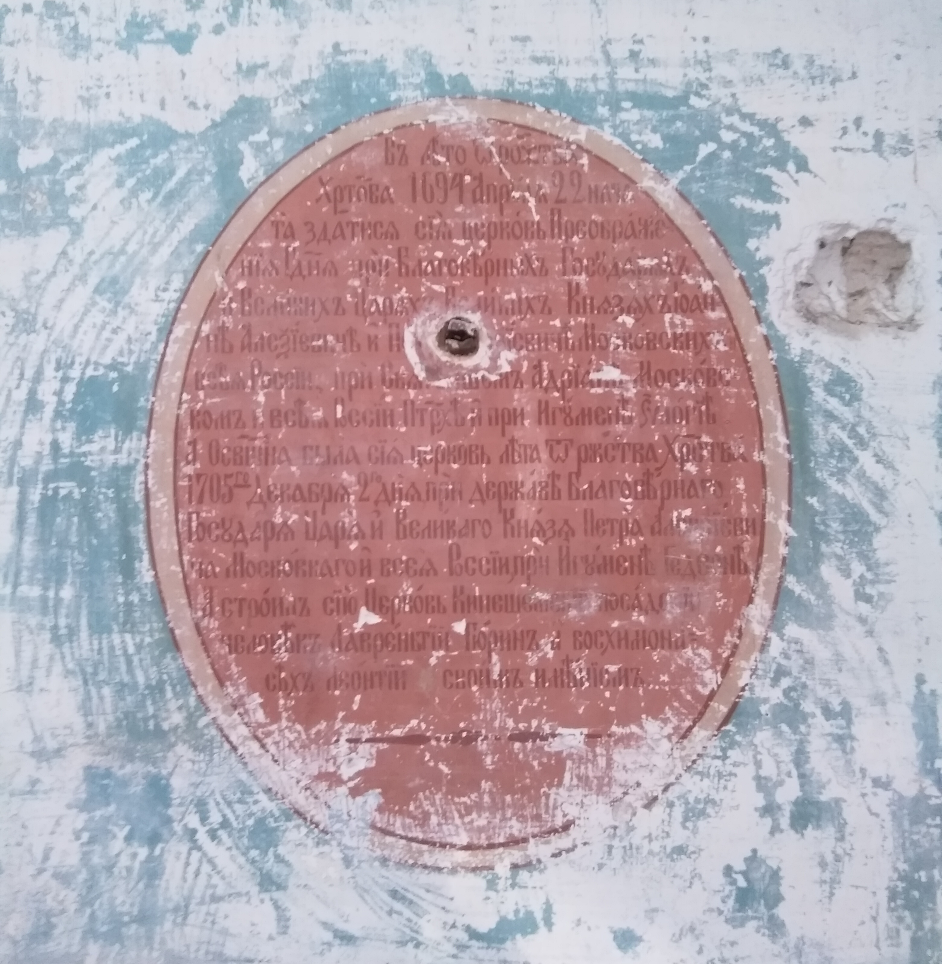 Надпись об основании храма Спаса Преображения Господня в Кинешме